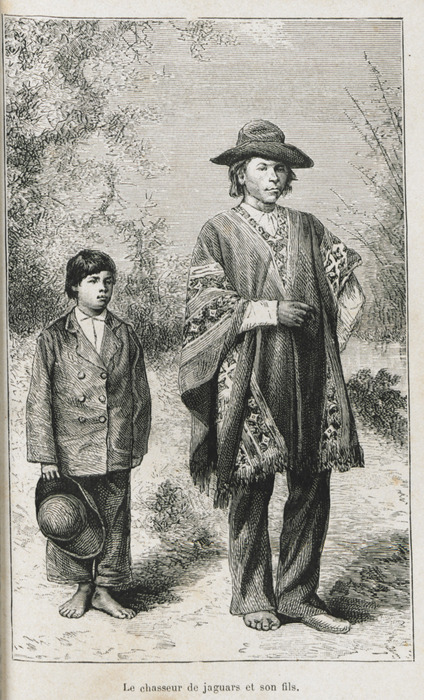 Le chasseur de jaguars et son fils Images : FRA110190120i1 par Théophile Novis, (dessinateur) in Arthur Thouar (1853-1908).- Explorations dans l'Amérique du Sud : I. A la recherche de la mission Crevaux. II. Dans le delta du Pilcomayo. III. De Buenos Aires à Sucre. IV. Dans le Chaco Boréal, Librairie Hachette et Cie, Paris, 1891.